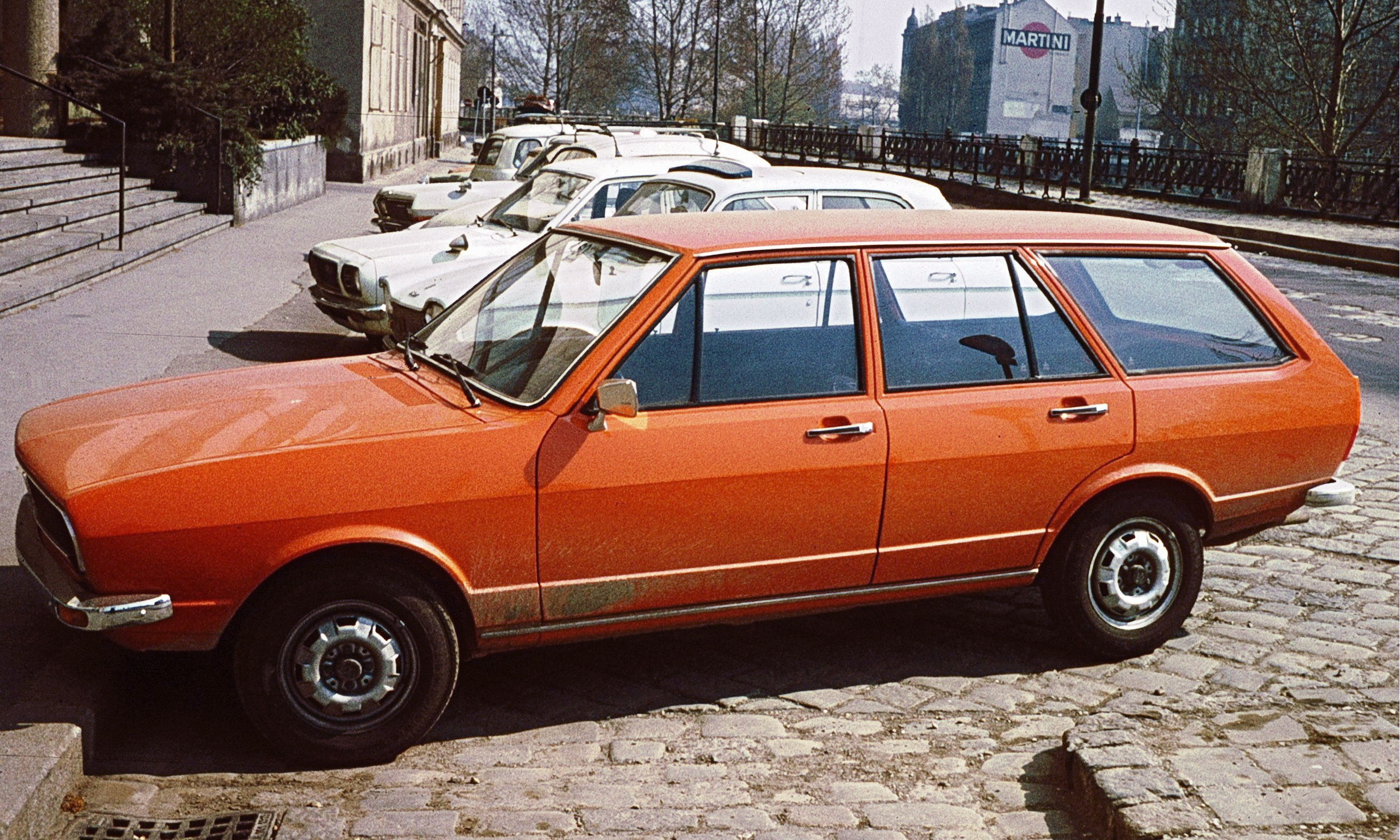 Volkswagen Passat Variant Wien 1973.